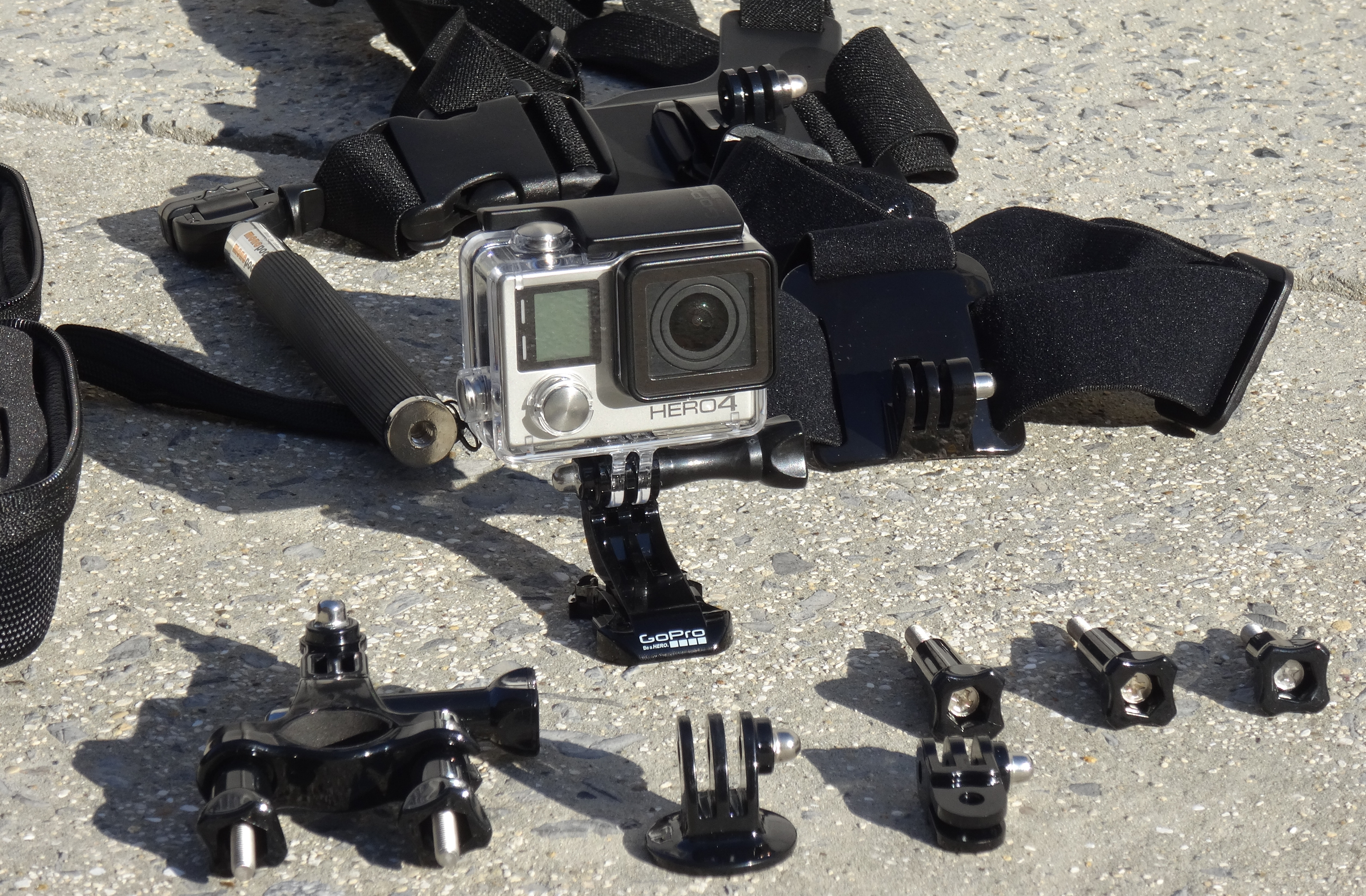 Cyclisme & GoPro : GoPro Hero 4 et accessoires.